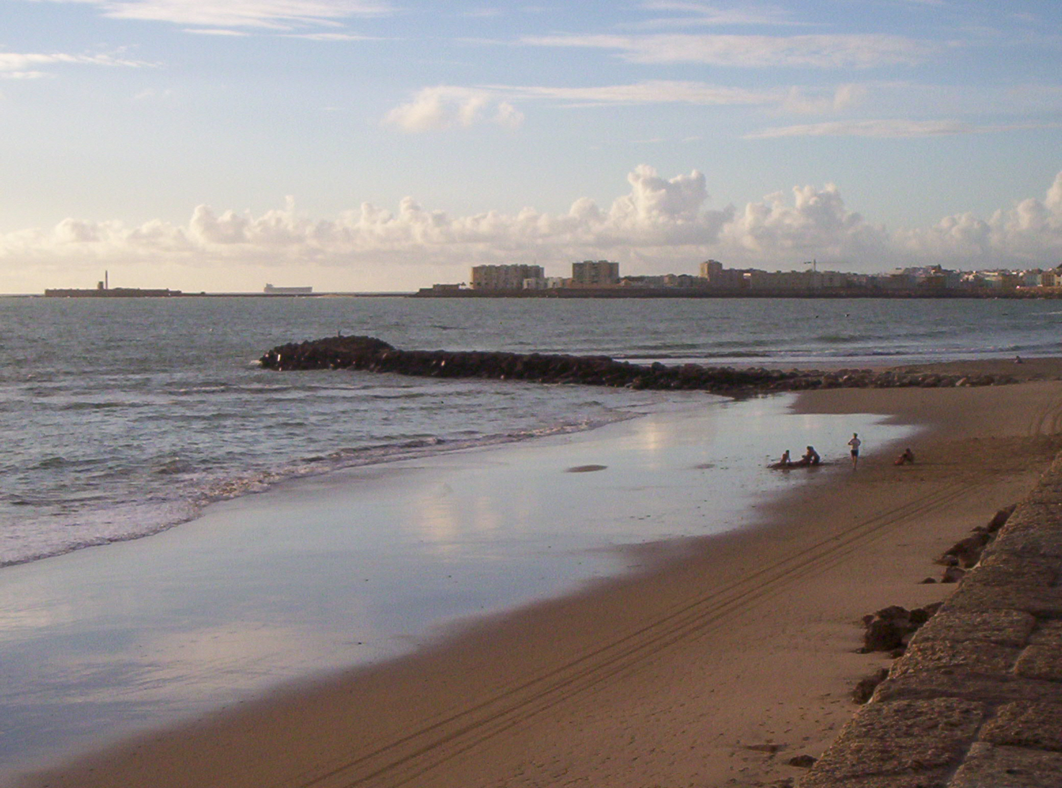 Foto del espigón que delimita el comienzo de la playa de Santa María del Mar y el término de la playa de la Victoria, ambas en Cádiz (España).